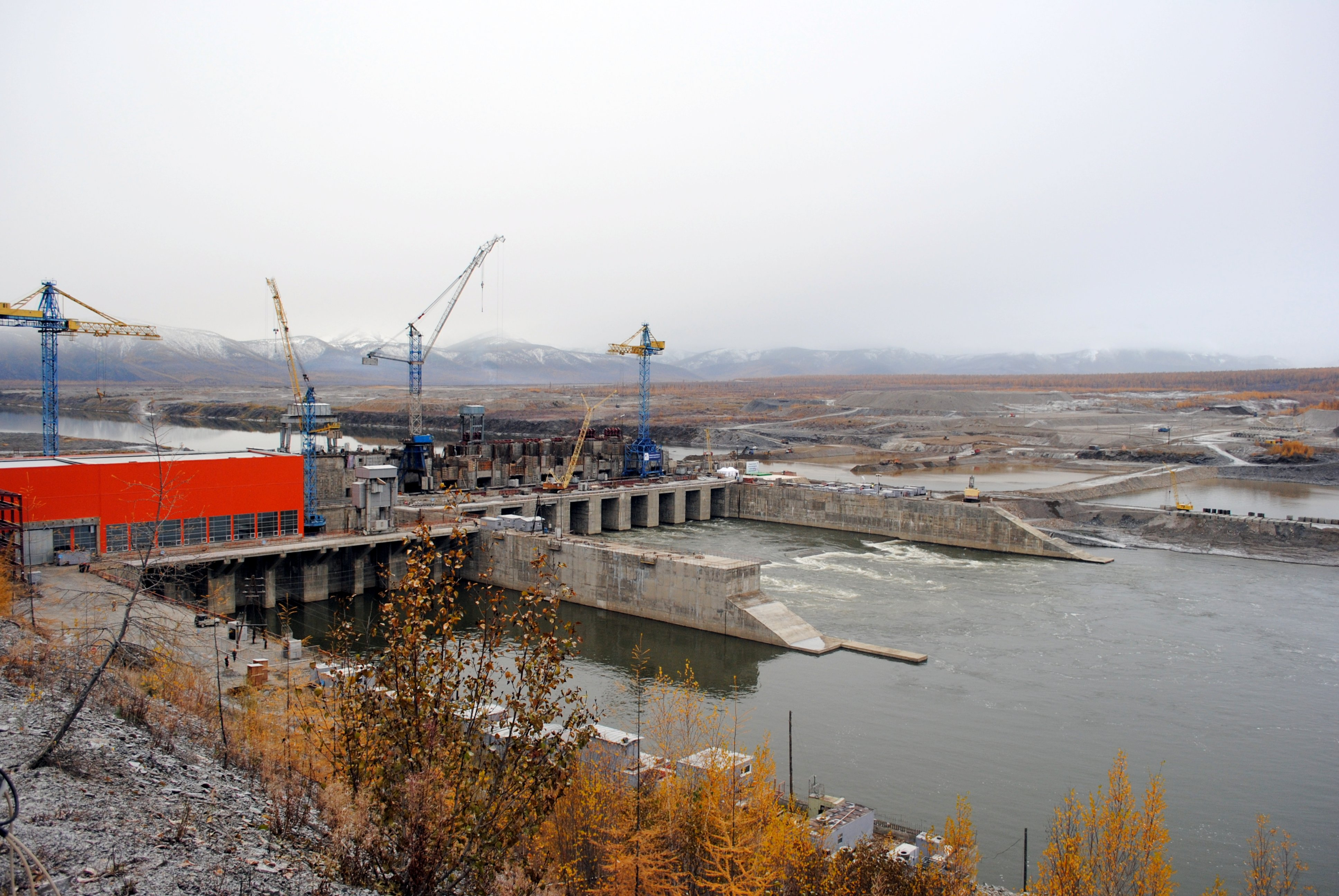 Усть-Среднеканская ГЭС, сентябрь 2011